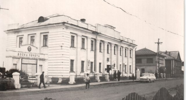 Красногорск, Красногорский район, Сахалинская область, райком КПСС, 60-е годы XX века.